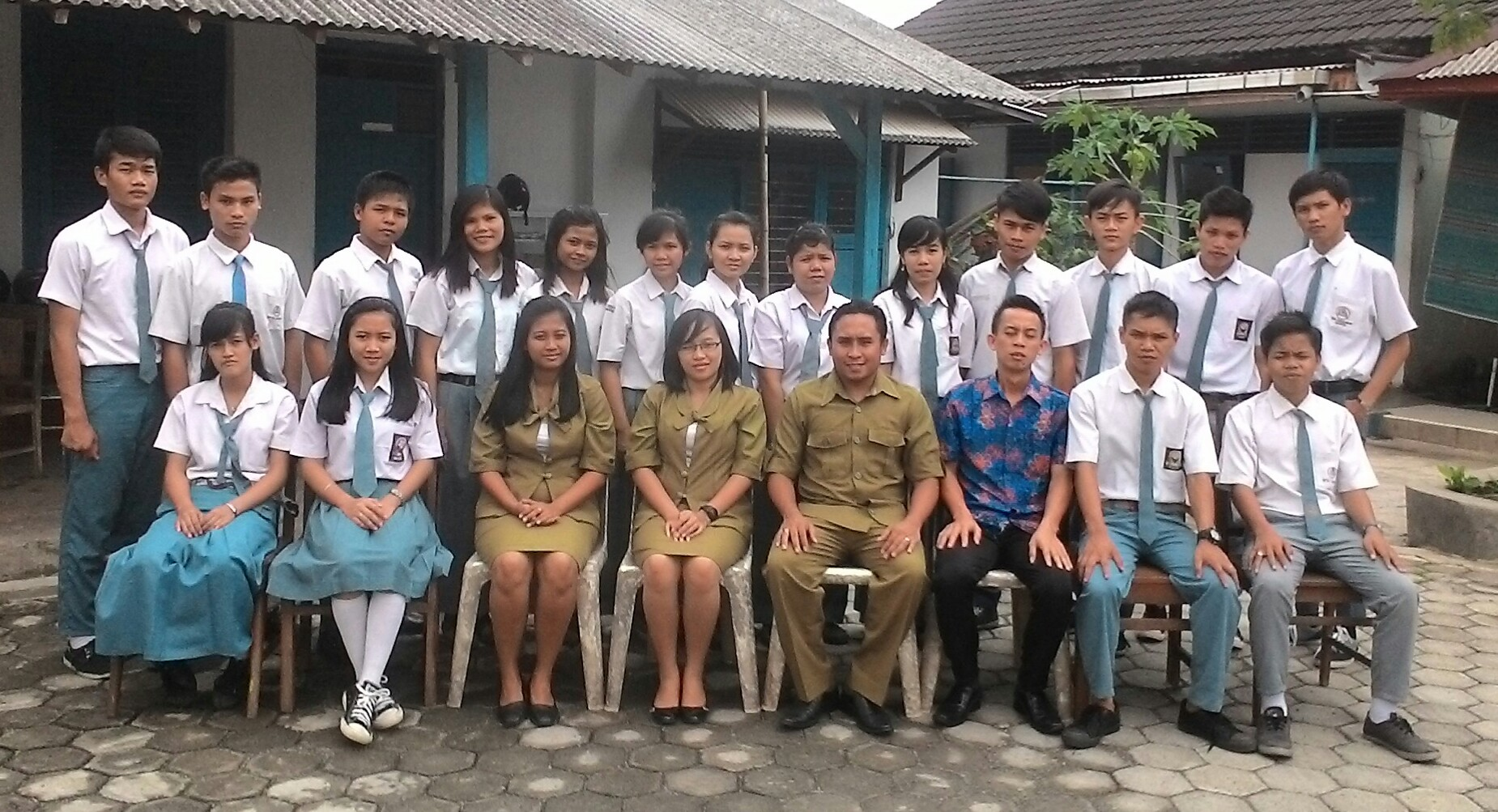 Foto siswa bersama pimpinan